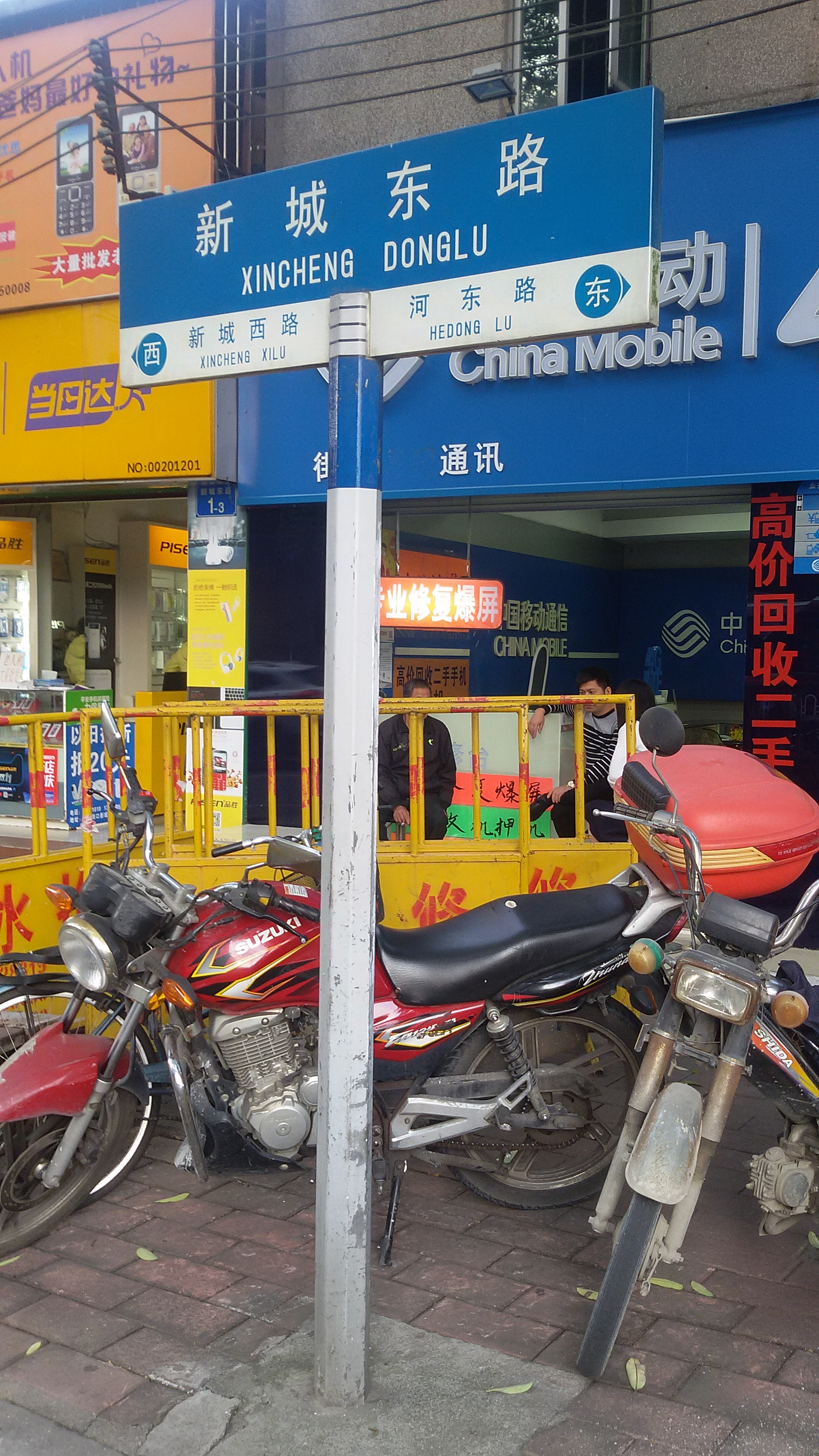 粵語: 廣州市從化區，新城東路近街口大橋上橋位